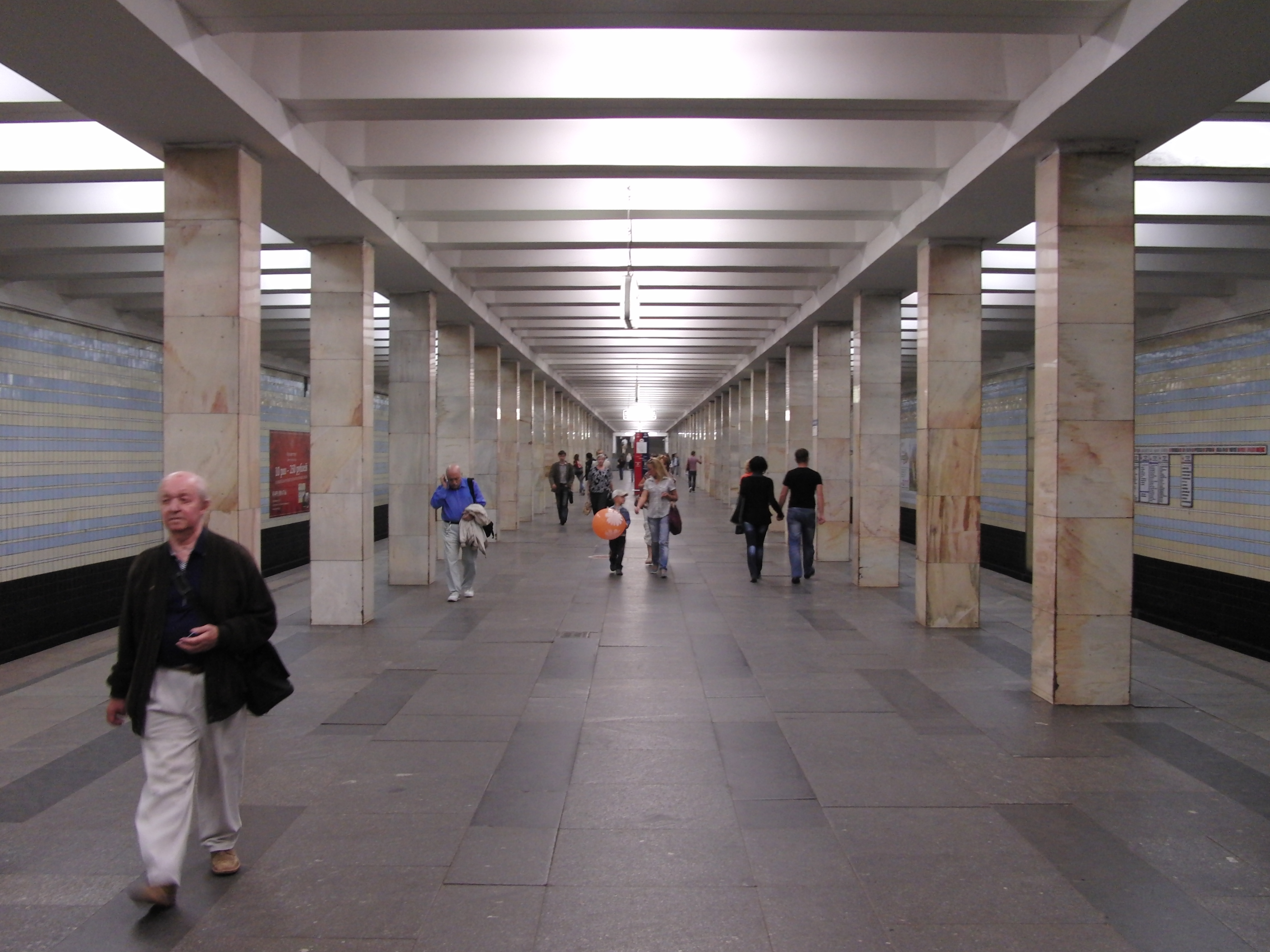 Prospekt Vernadskogo